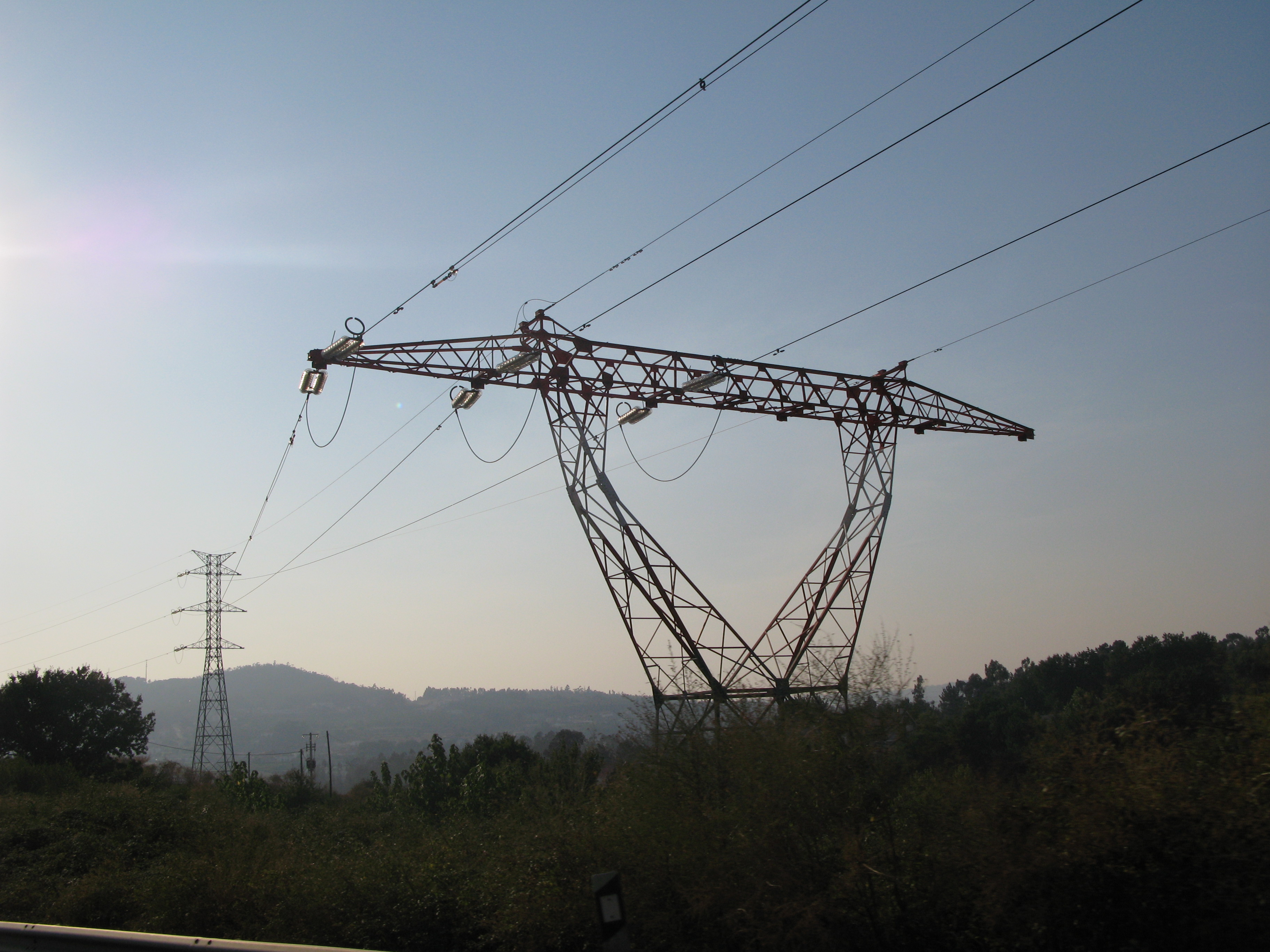 Torre de transporte de energia eléctrica localizada na Auto-estrada Póvoa de Varzim.